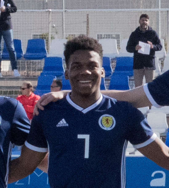 espana-escocia-sub19-3